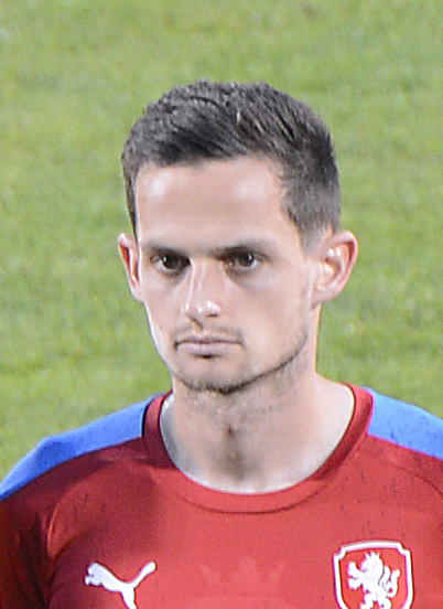 Mezinárodní fotbalový zápas Česko - Rakousko v Olomouce